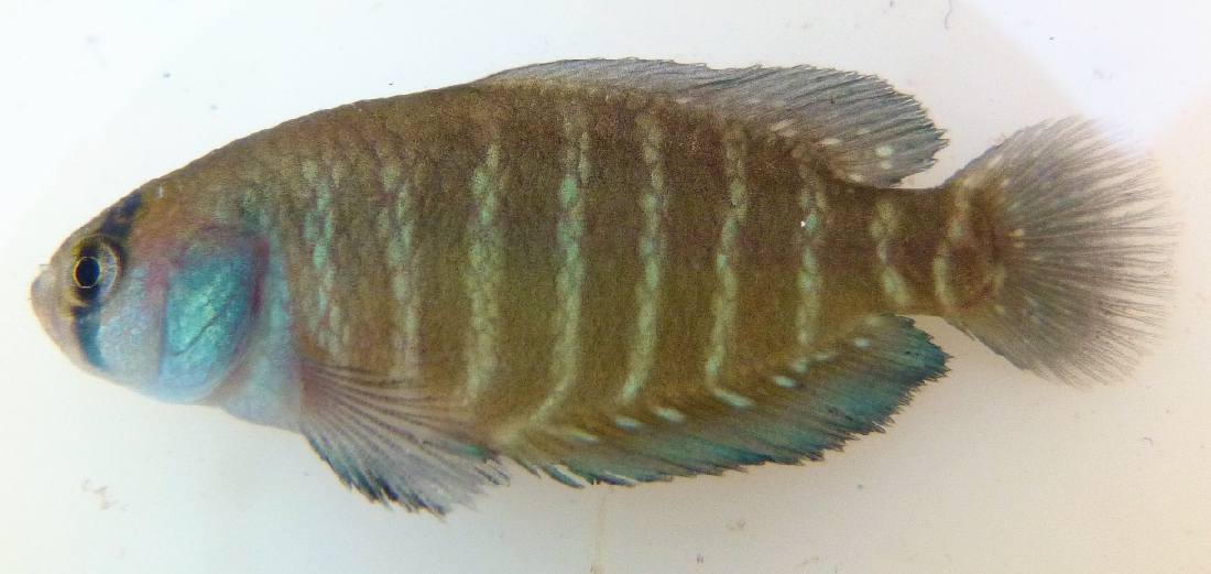 Ejemplar macho, paratipo, ZVC-P 11620, Río Queguay, Dpto. de Paysandú, URUGUAY